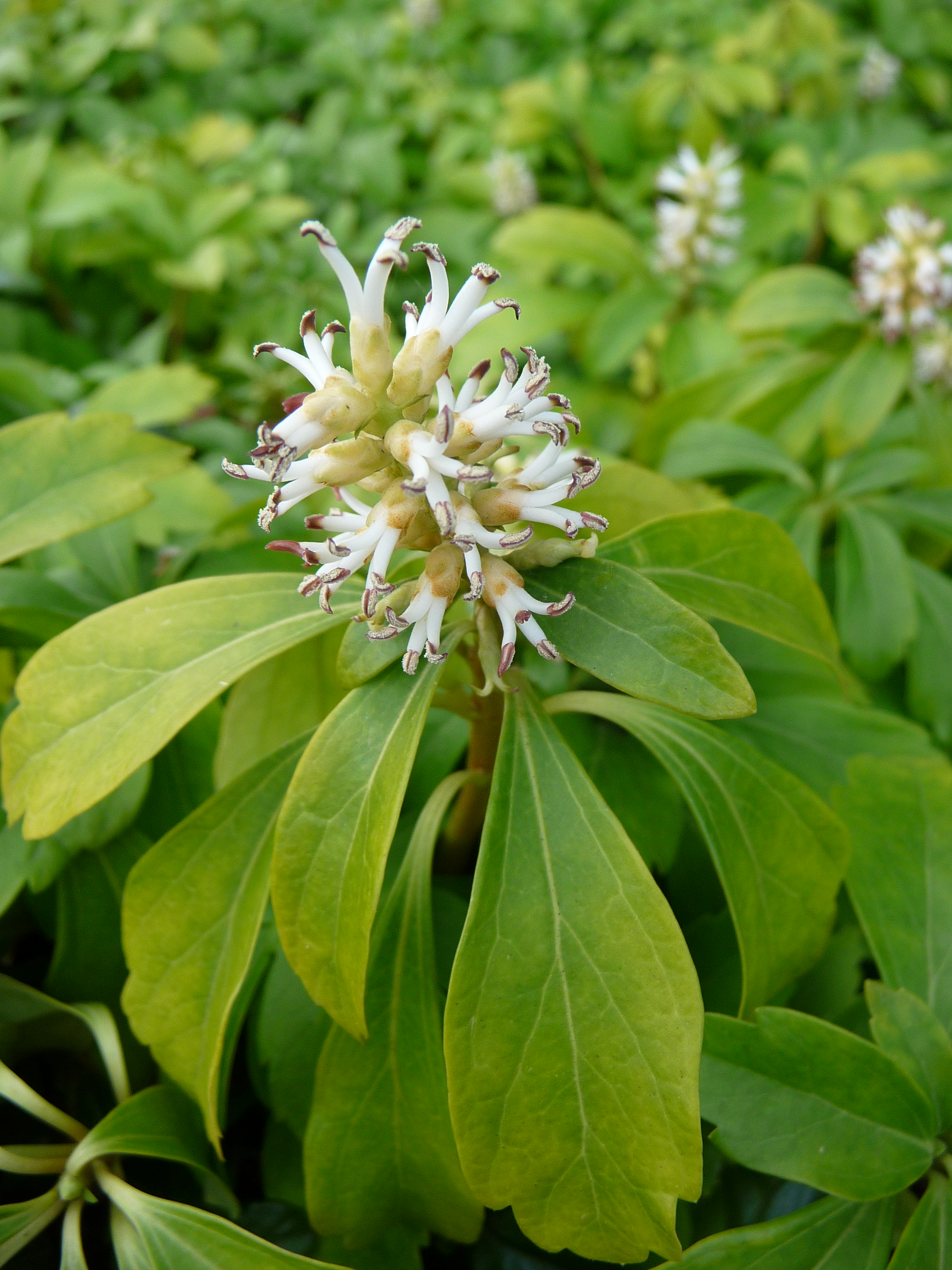 Blühender Bodendecker Dickmännchen oder Japanischer Ysander (Pachysandra terminalis), fotografiert in Heidelberg (Baden-Württemberg, Deutschland)